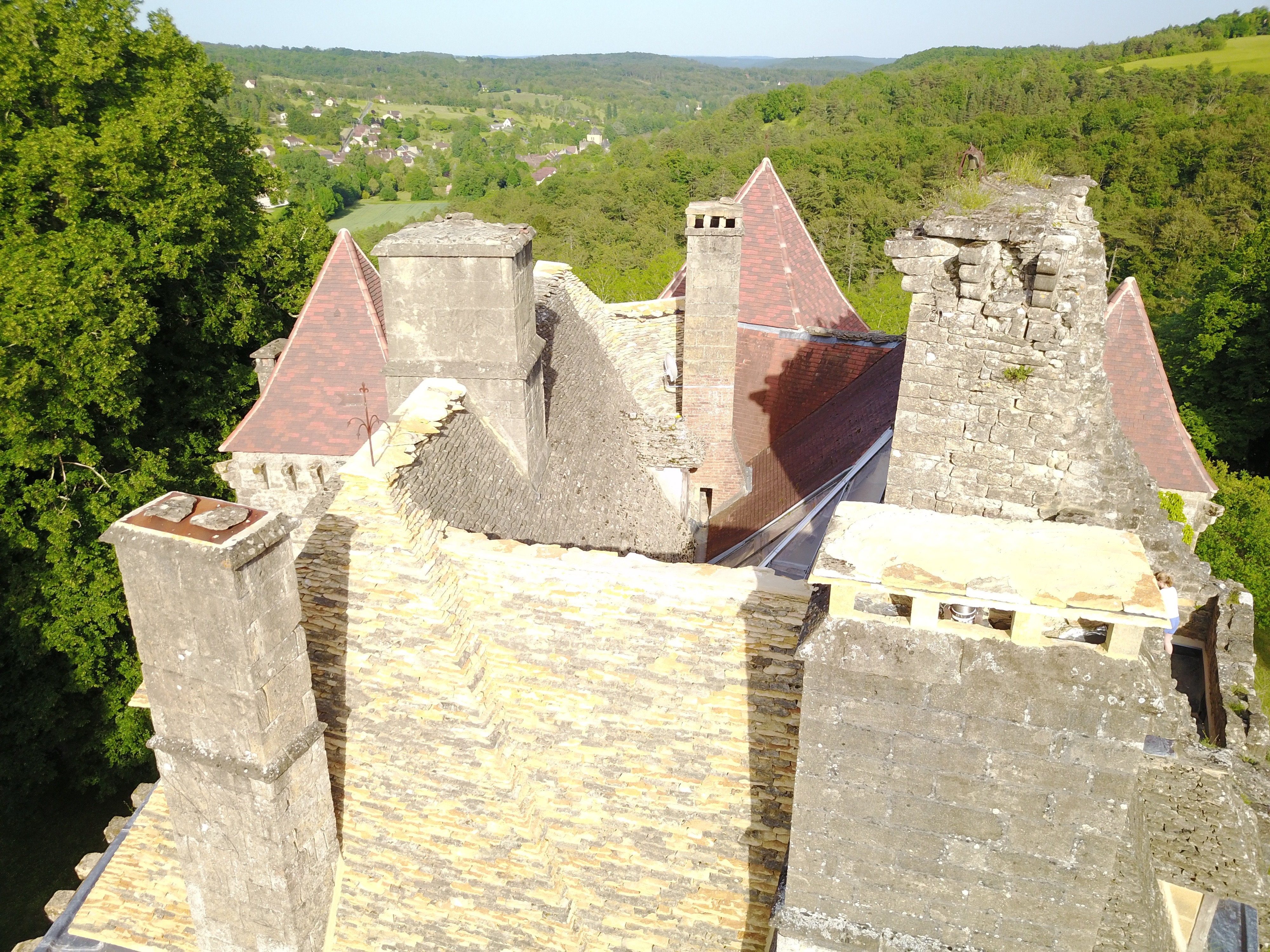 Toitures en lauzes